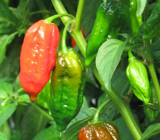 Dorset Naga peppers